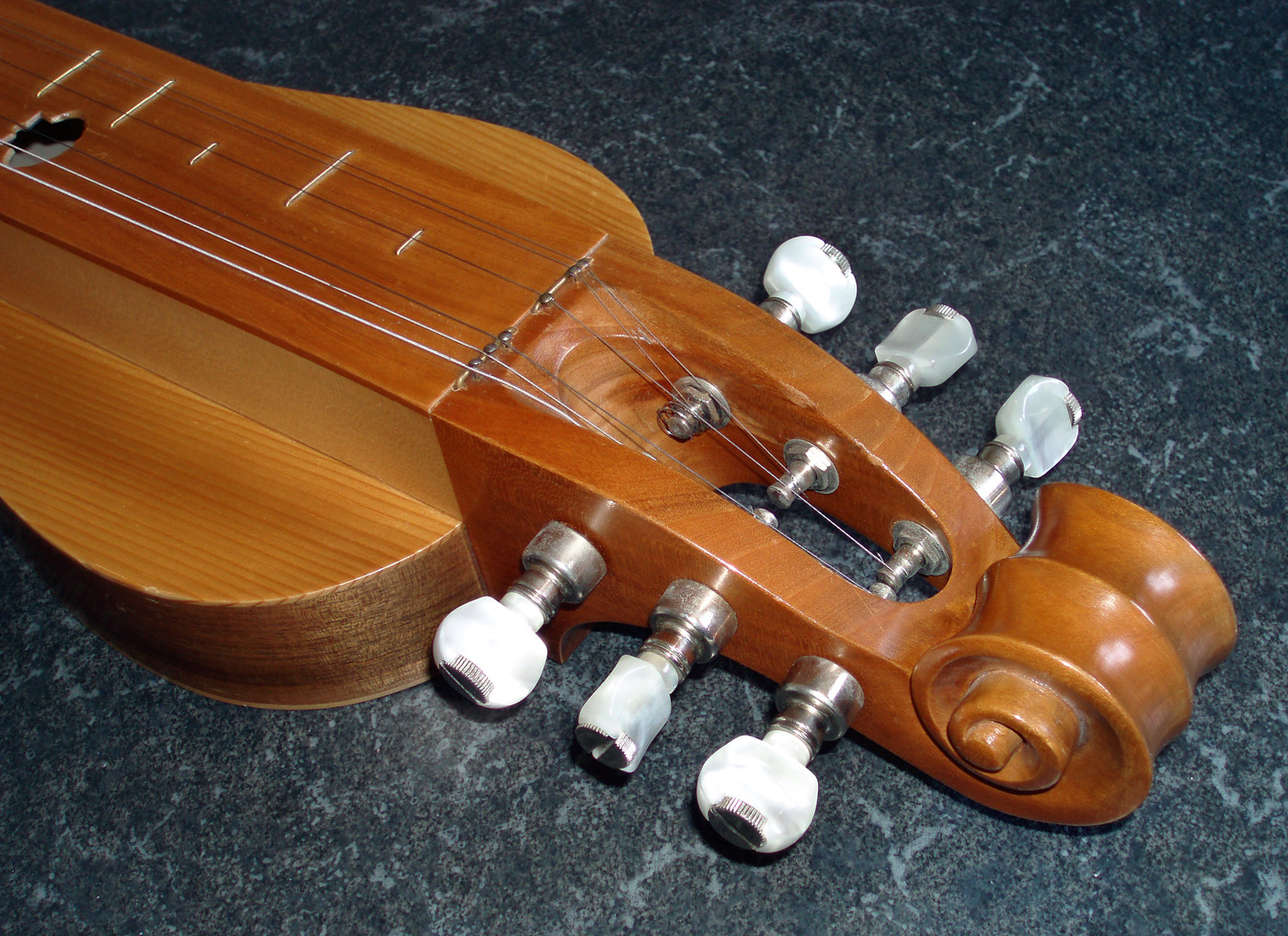 Epinette des vosges chromatique de fabrication moderne (luthier : Christophe Toussaint). Vue du chevillier et des cordes. On remarque les frettes des touches chromatiques et le doublement de la première chanterelle.